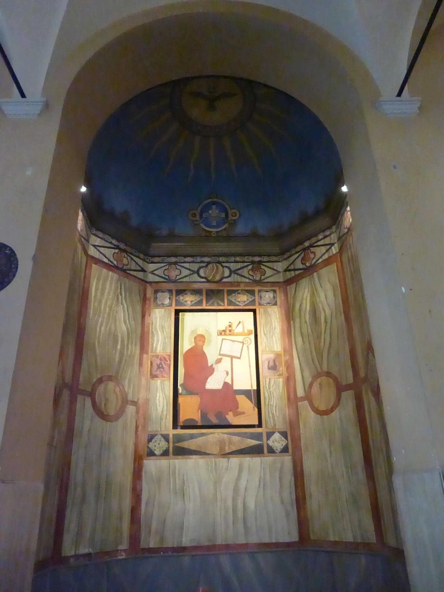 Roma, S. Giuseppe a via Nomentana, cappella di S. Agostino